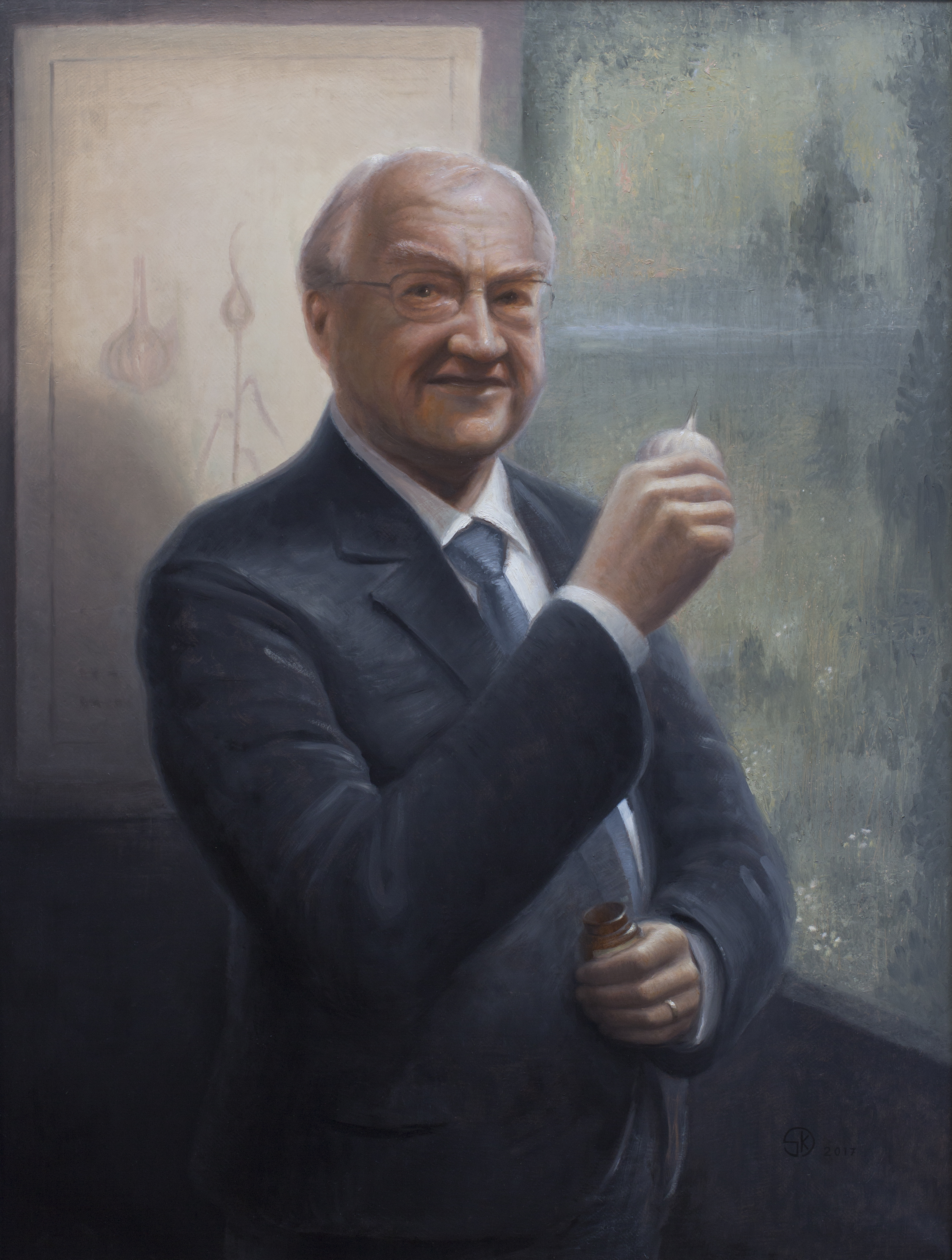 Taidemaalari Sampo Kaikkosen maalaama muotokuva professori Raimo Hiltusesta. Öljyvärimaalaus, 100 x 75 cm, 2017. Omistaja Helsingin yliopiston Pohjois-Pohjalainen Osakunta.